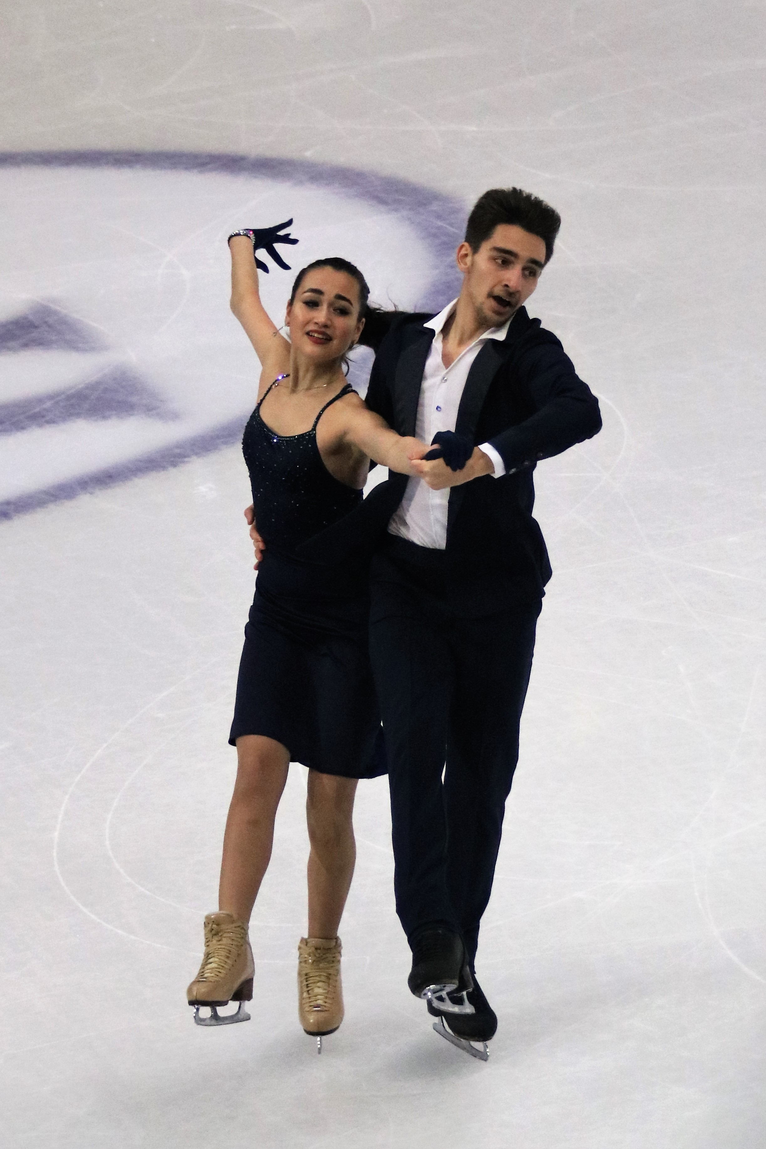 Елизавета Худайбердиева / Никита Назаров (Россия) на финале юниорского Гран-при 2019-2020